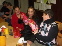 Kiemelt Terjesztők karácsonya, 2009 (Fedél Nélkül)